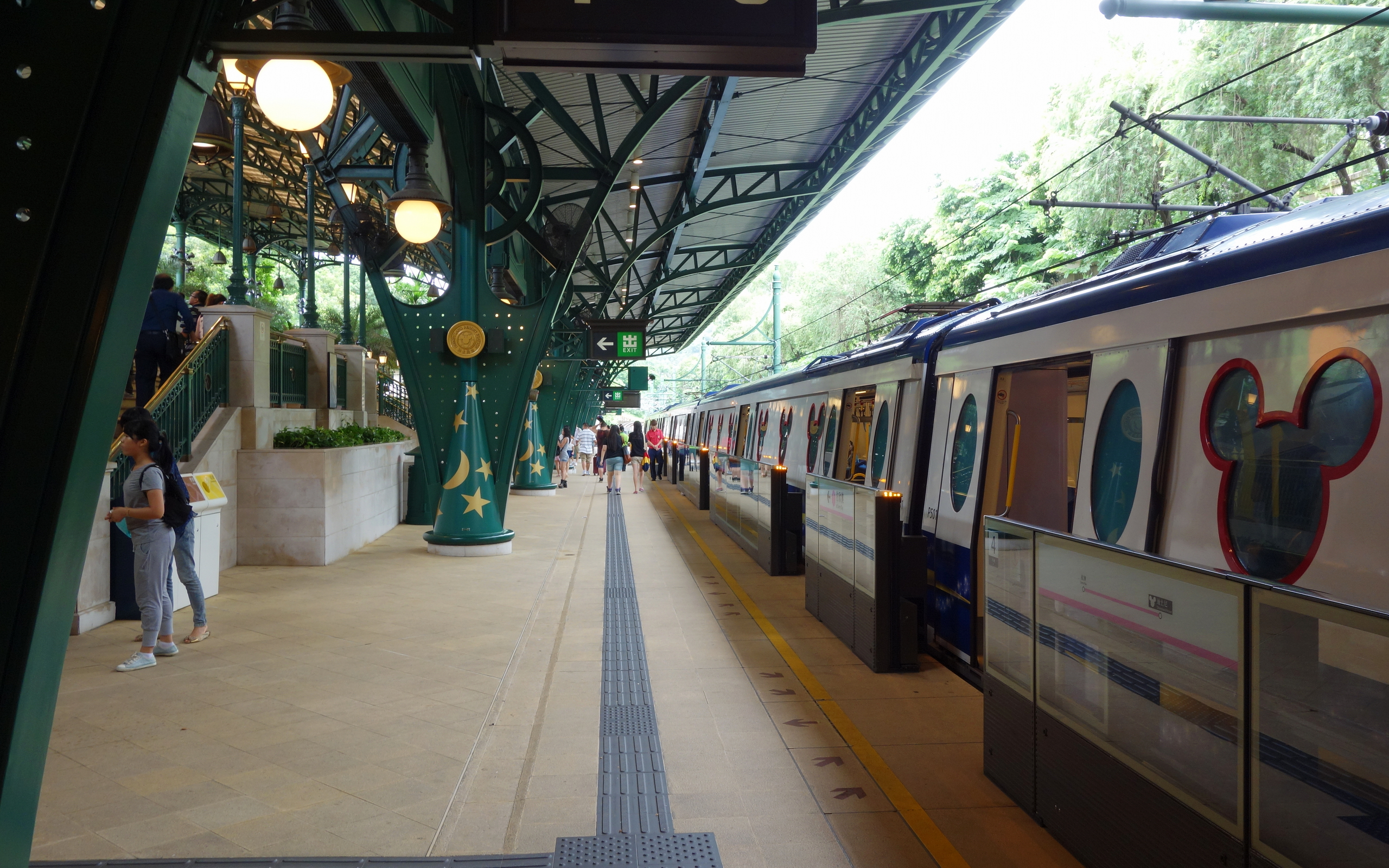 迪士尼站站台